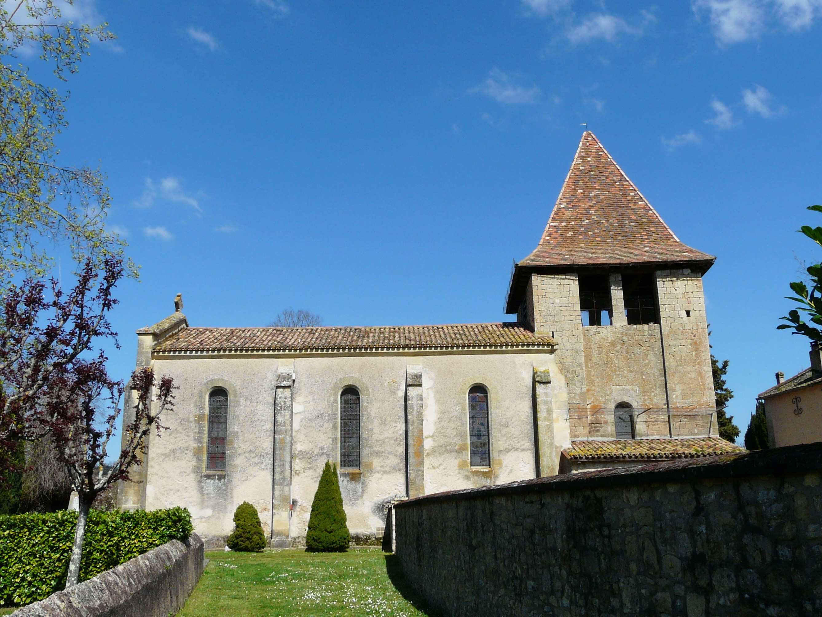 L'église de Pontours, Dordogne, France.